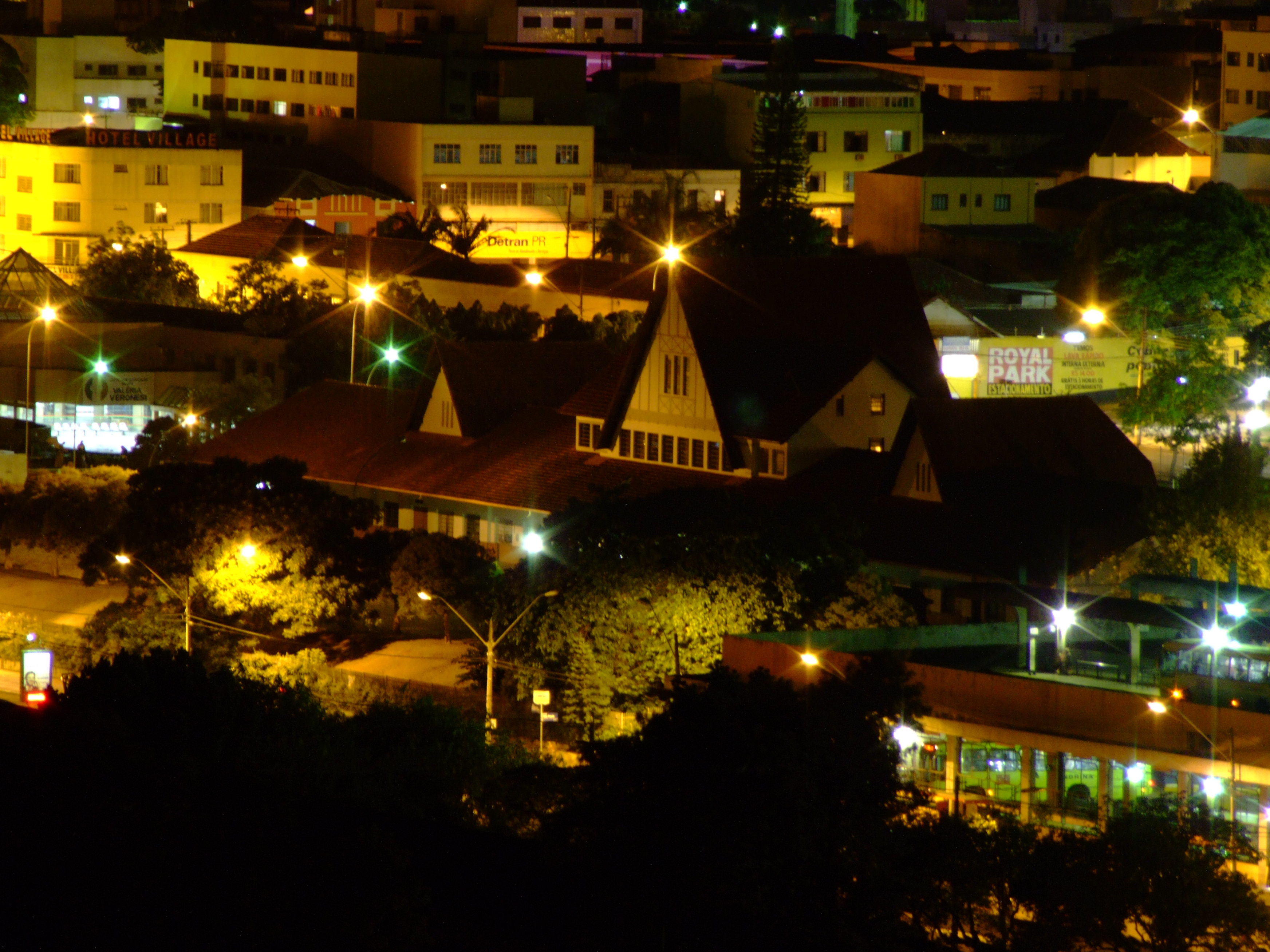 antiga estação ferroviaria noturna 2009-01-11 Isack